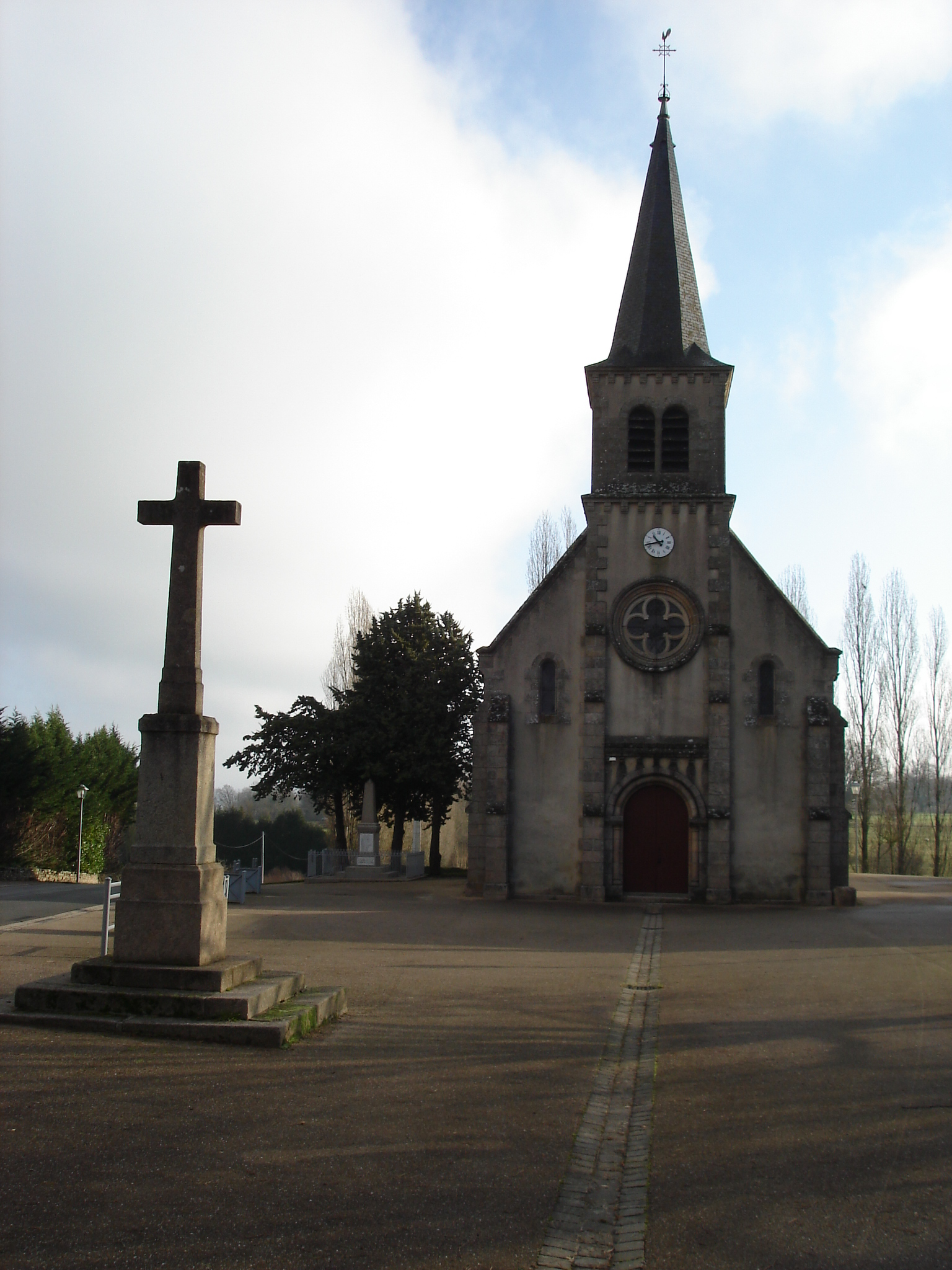 Pouligny-Notre-Dame (36) : L'église.